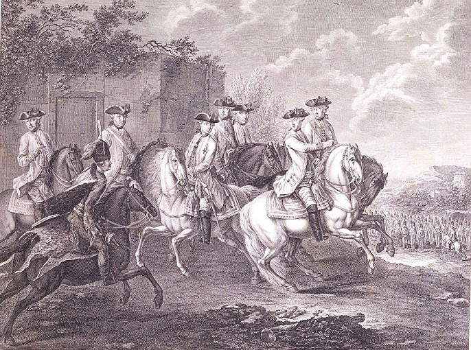 Johann Christian Brand (1722–1795): Kaiser Joseph II. mit sieben seiner Generäle zu Pferd. Radierung, Wien 1779, verlegt von Christian von Mechel in Basel.